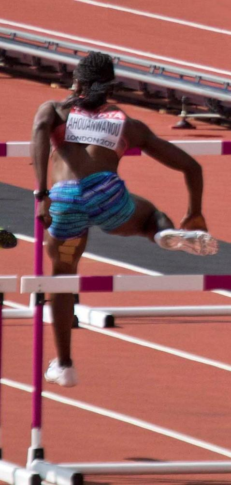 d1_2 thiam 100mh